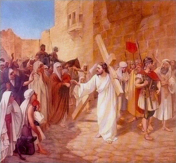 "El Cristo del Perdón", obra del Maestro Francisco Antonio Cano, exhibida en la Catedral Metropolitana de Medellín. Colombia